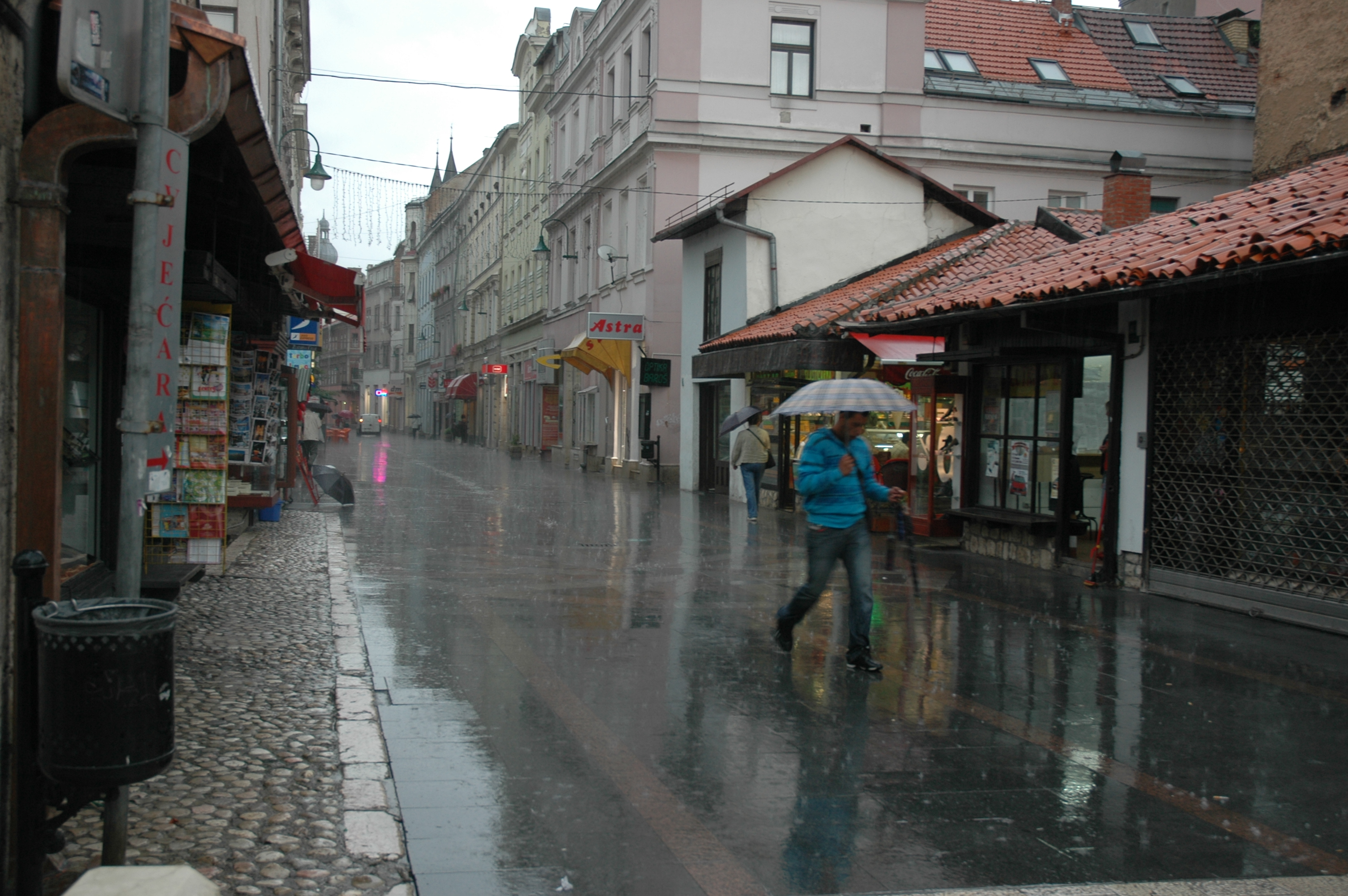 Sarajevo, Bosnia and Herzegovina